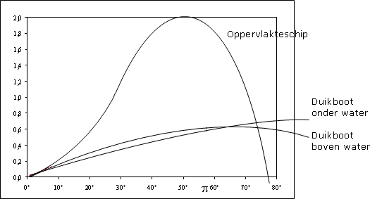 Eigen ontwerp.